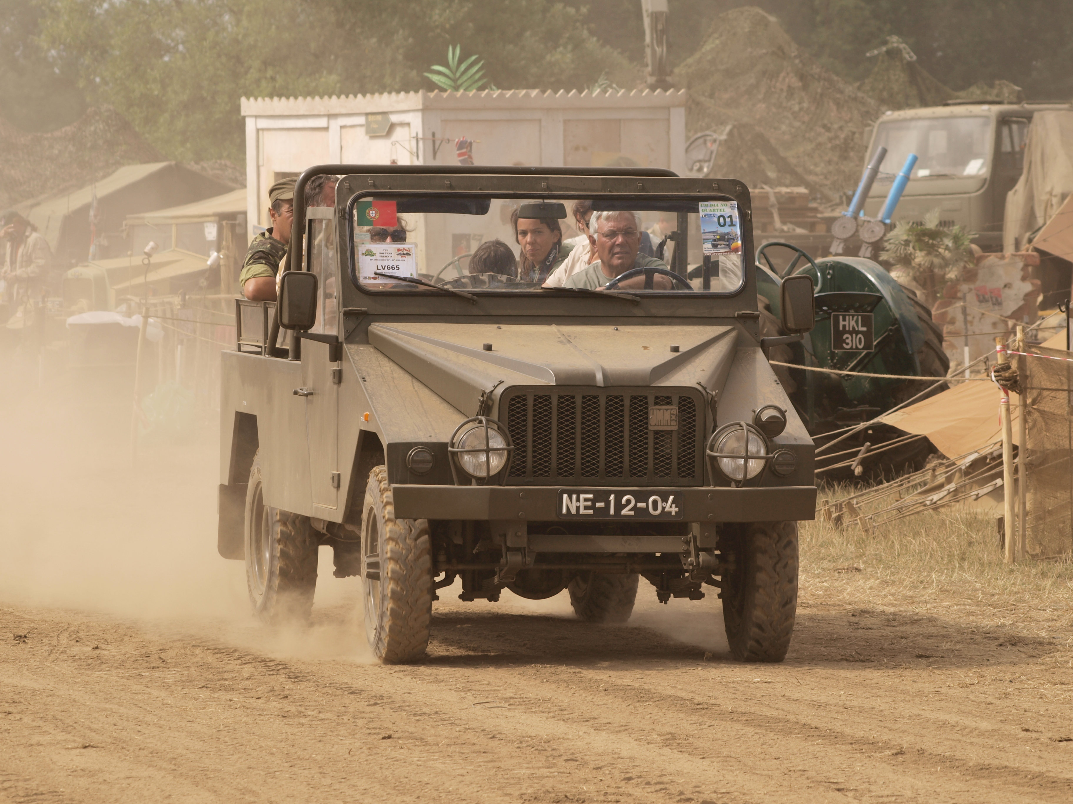 UMM Entrepeneur (1983) (owner Alberto Rebelo).